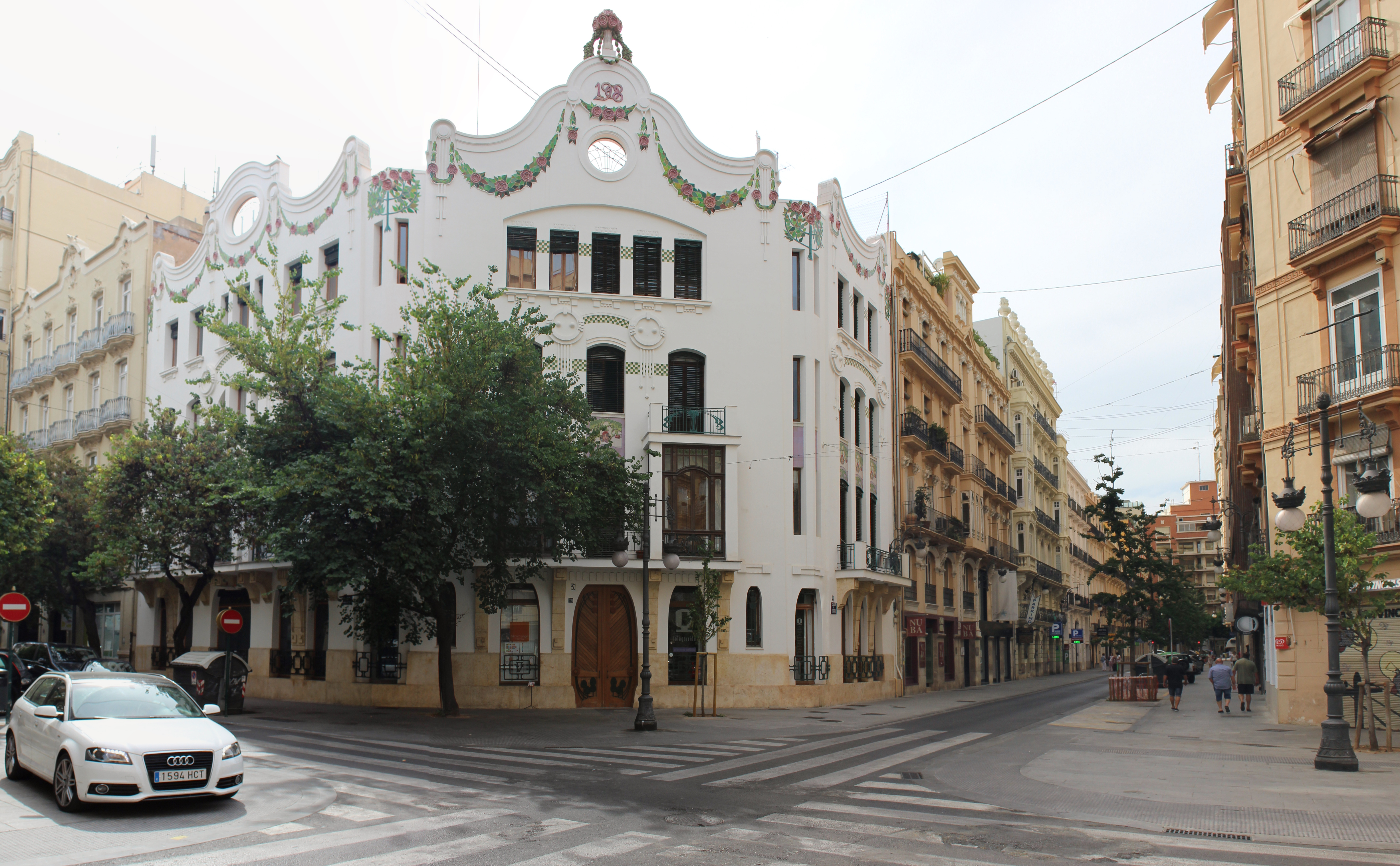 Edificio Ferrer de Vicente Ferrer Pérez en la calle Cirilo Amorós n.º 29, 1908